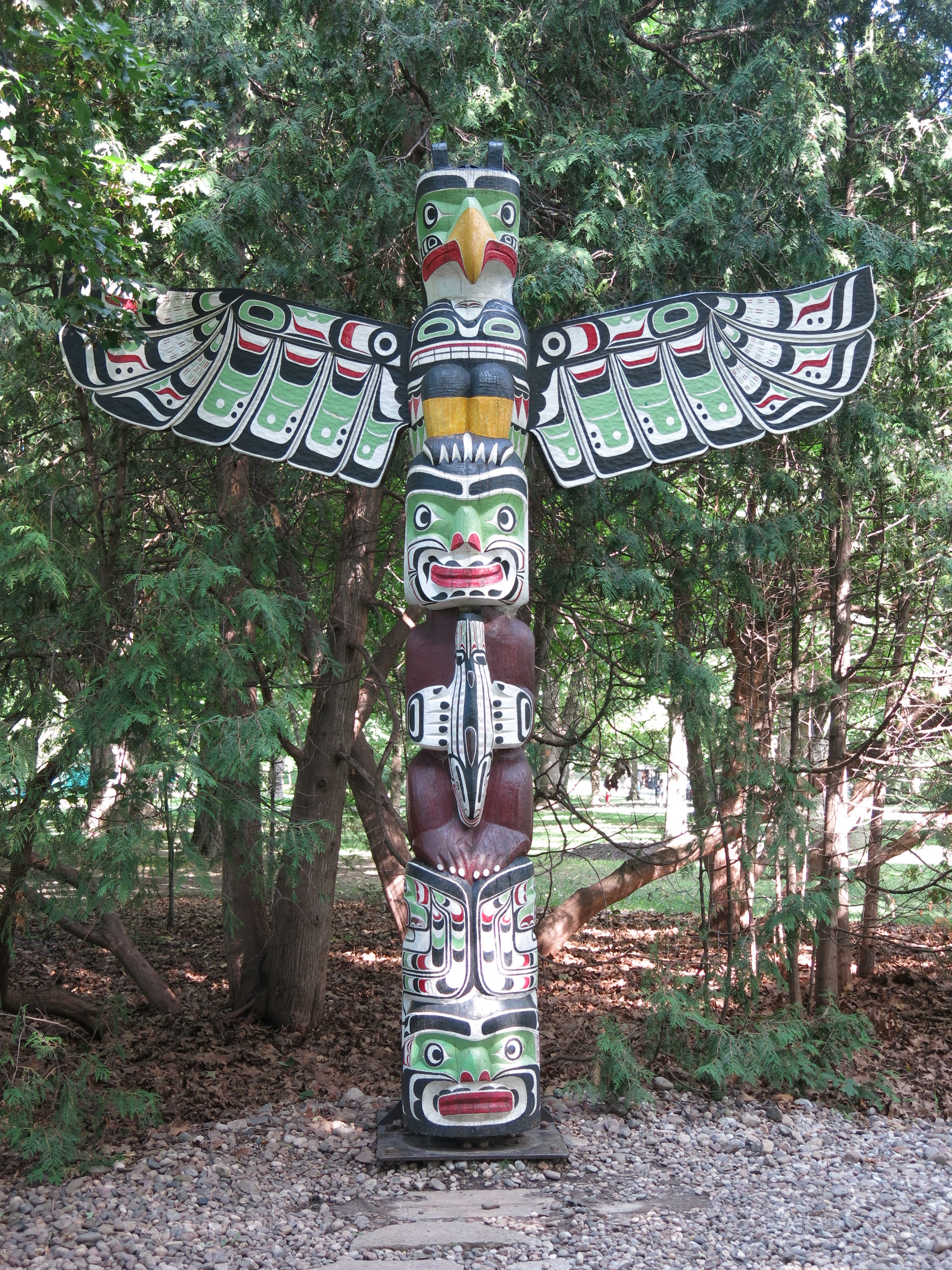 Rideau Hall, le complexe dans son ensemble, 1 Sussex Drive, Ottawa (Canada). (Protection Classified Federal Heritage Building. Voir la liste des lieux patrimoniaux d'Ottawa pour plus de détails).